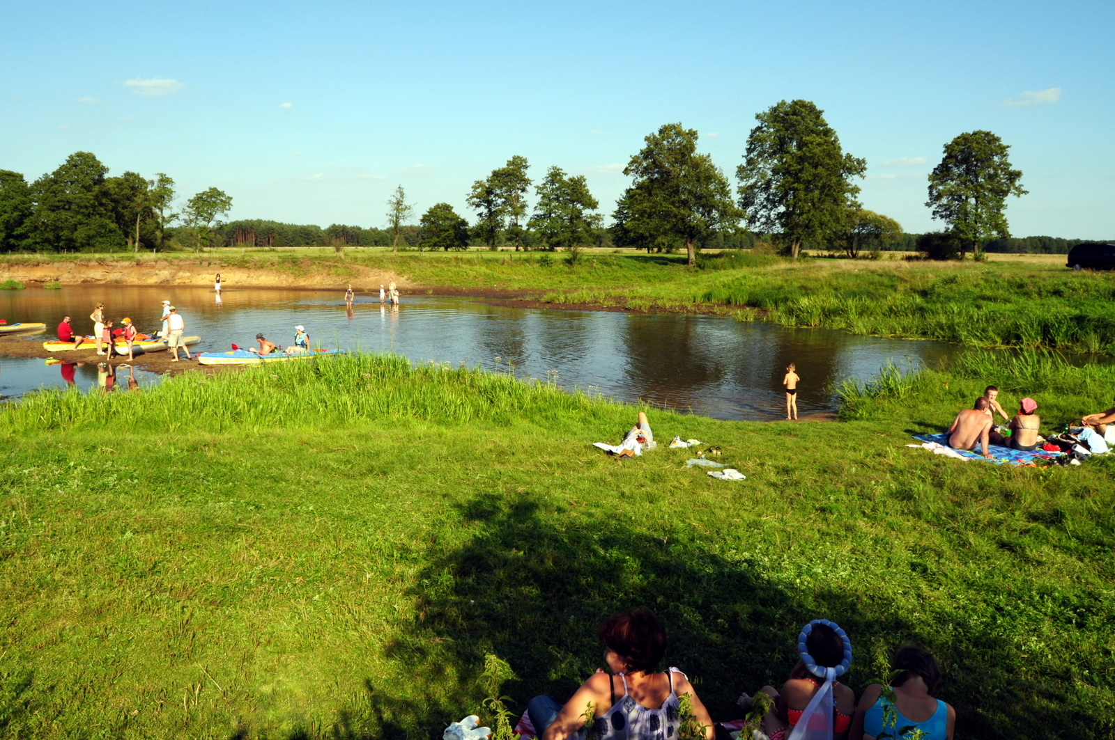 Letnicy nad Liwcem. Za rzeką rozpoczyna się Podlasie.